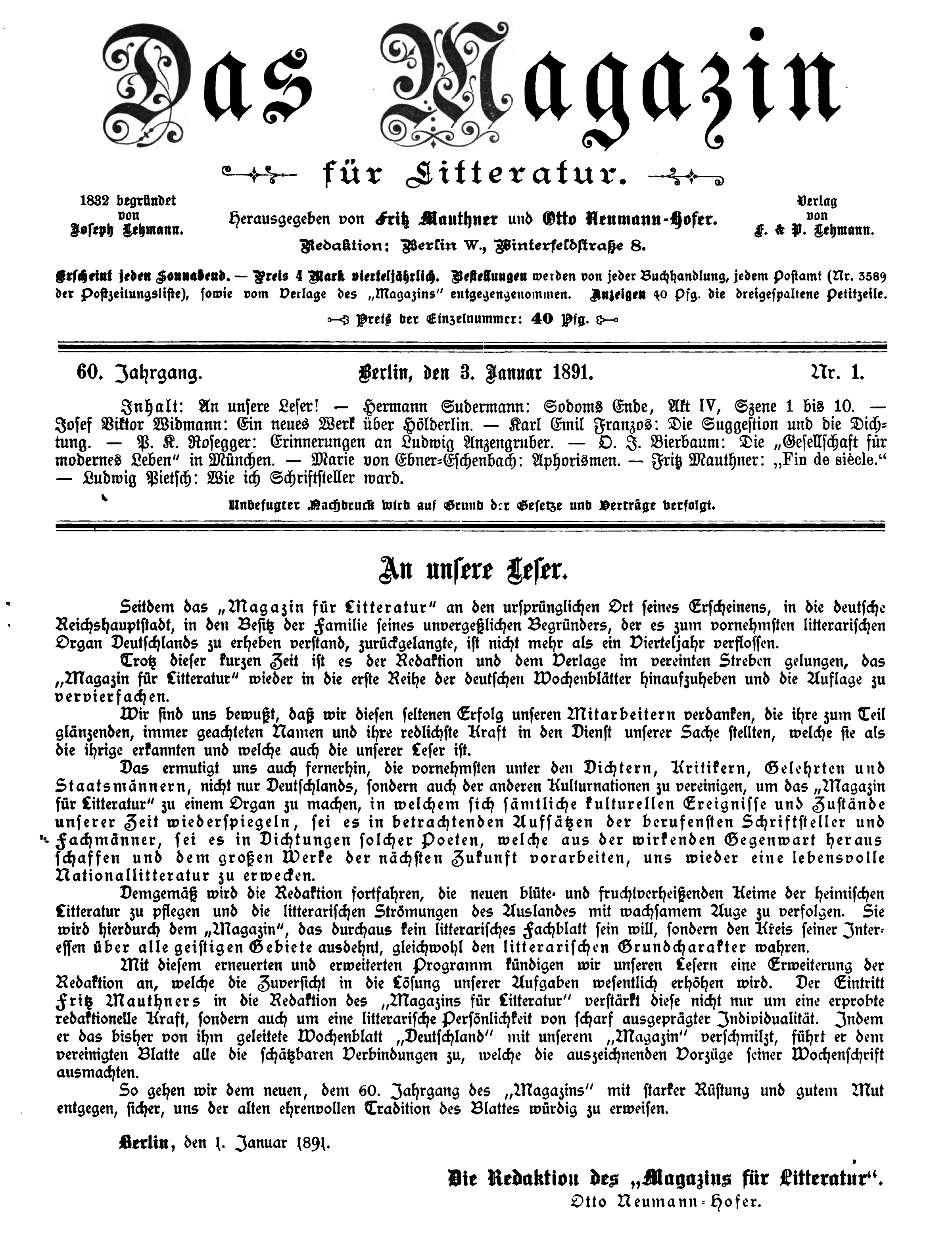 Titelseite der Ausgabe 1/1891 des Magazins für Litteratur